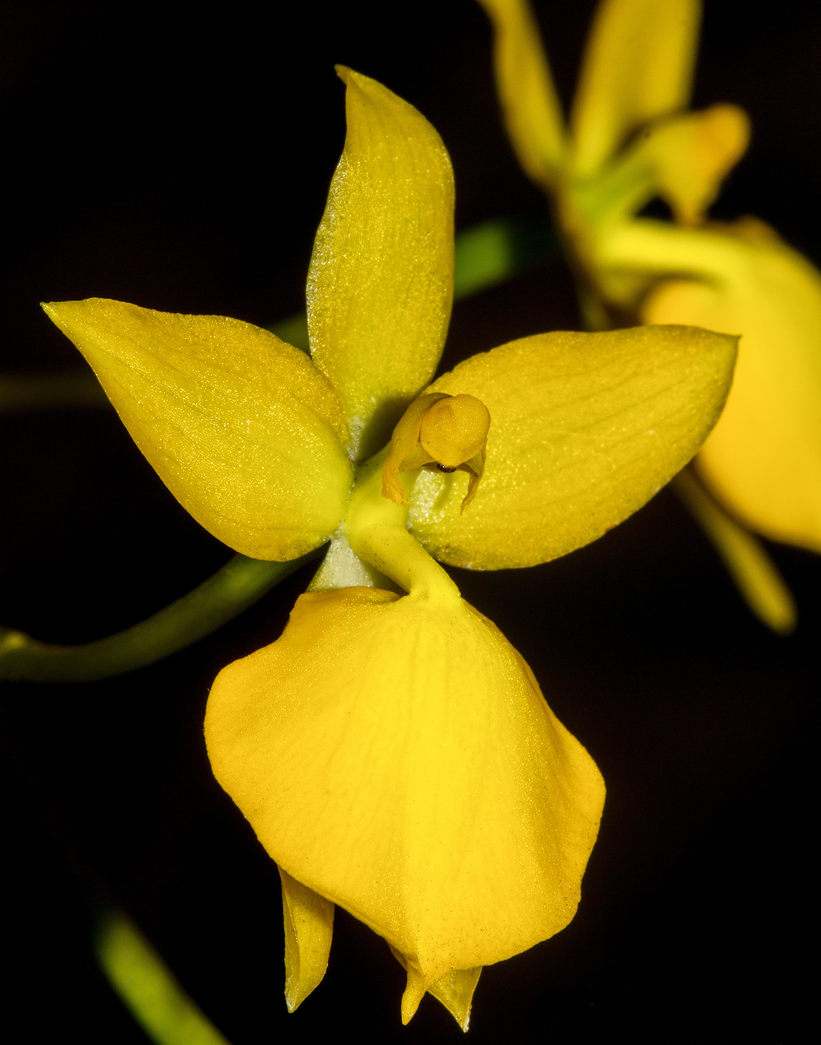 Cyrtochilum aureum (Oncidiinae) from Ecuador - Jardín Botánico de Quito